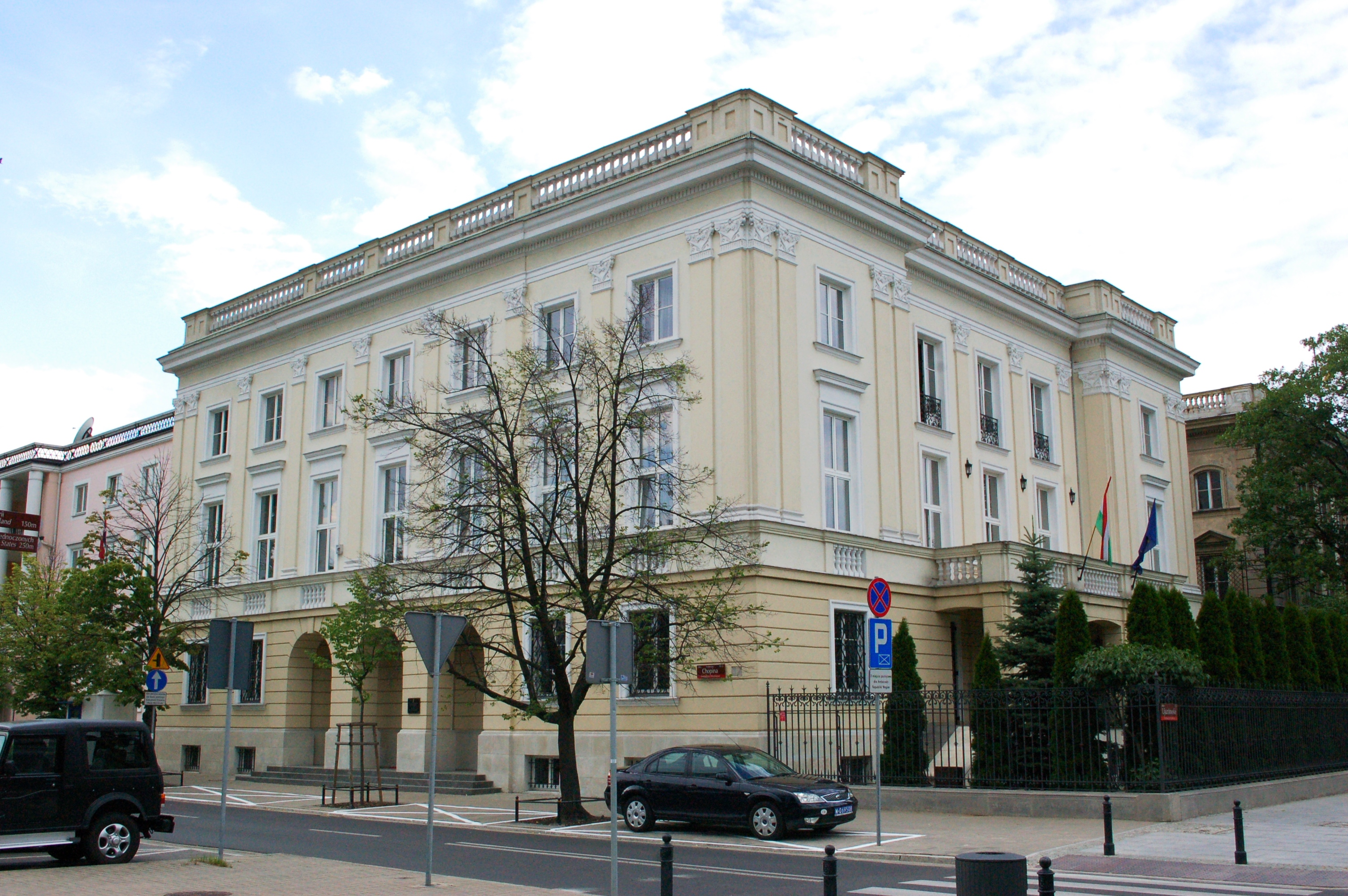 Warschau